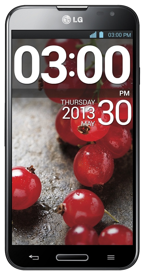 LG전자는 현지시각 10일부터 미국 이통사업자 AT&T를 통해 ‘옵티머스 G Pro’를 선보이며 글로벌 순차 출시에 속도를 내고 있다.